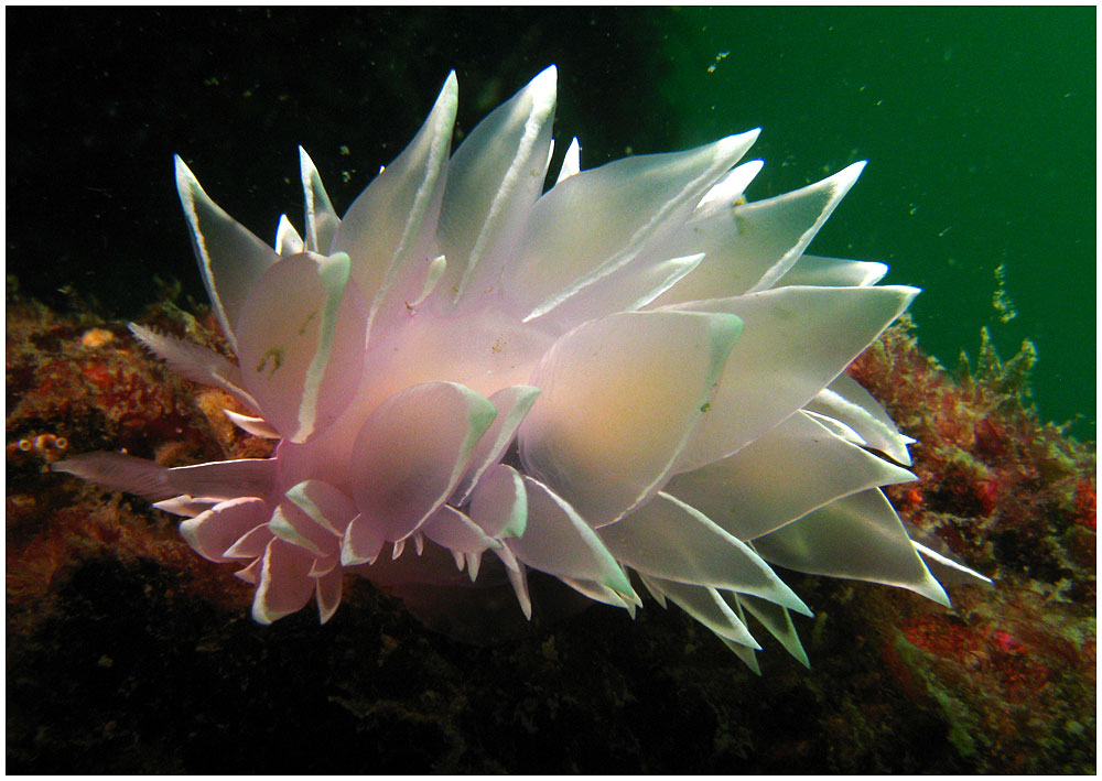 Dirona albolineata, Odgen Point, Columbia Británica, Canadá